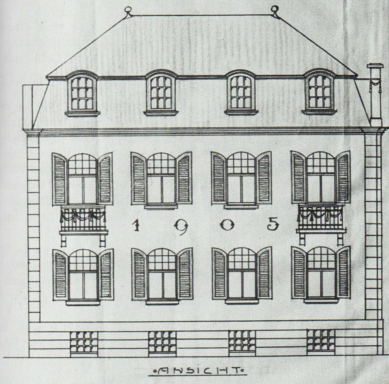 Villa Bungarten, Adenauerallee 89a, Bonn-Gronau: Aufriss (Entwurf) der Straßenfront 1905 nach W. und H. Bungarten